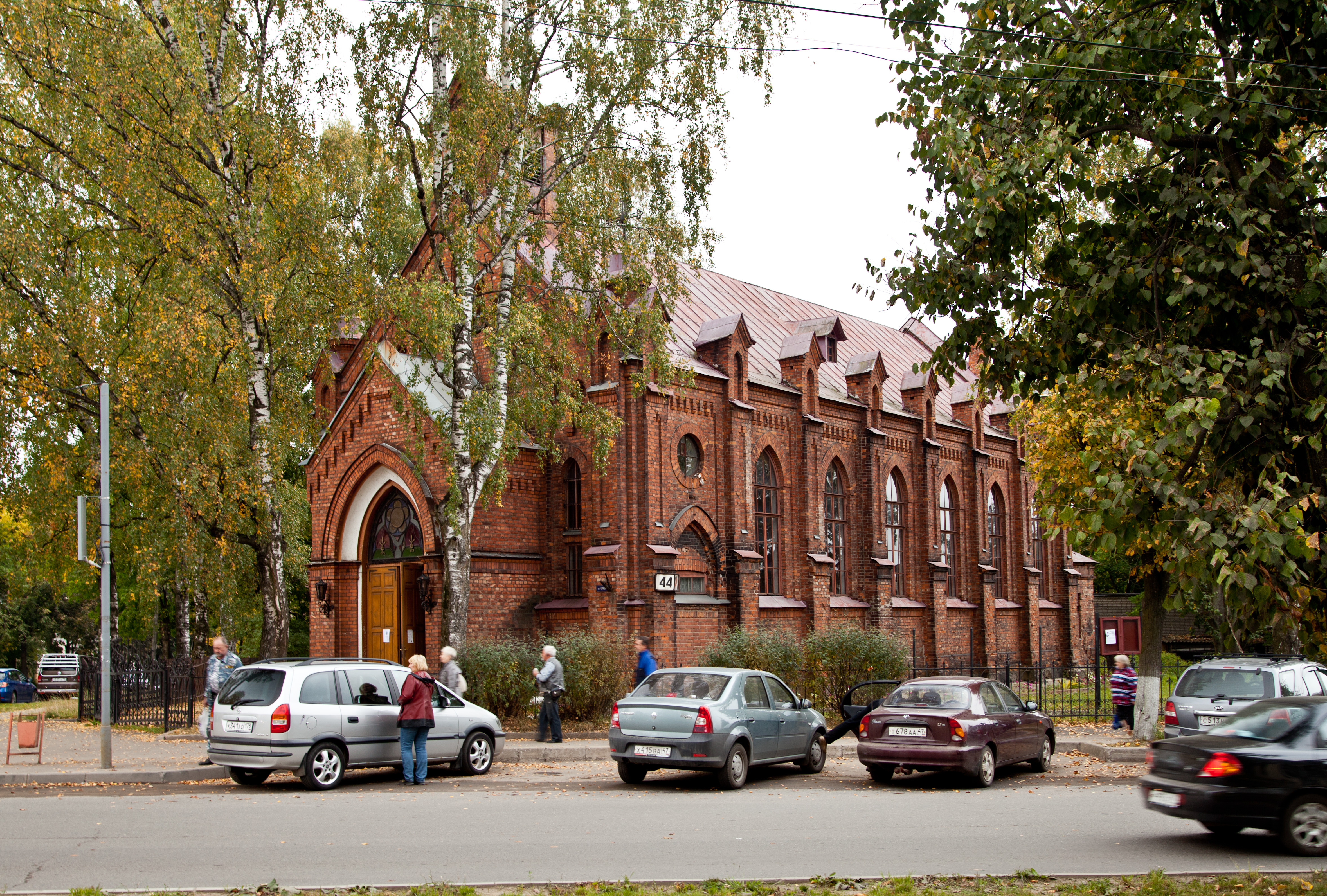 (Санкт-Петербург и Лен.область, Луга, урицкого улица, 44)